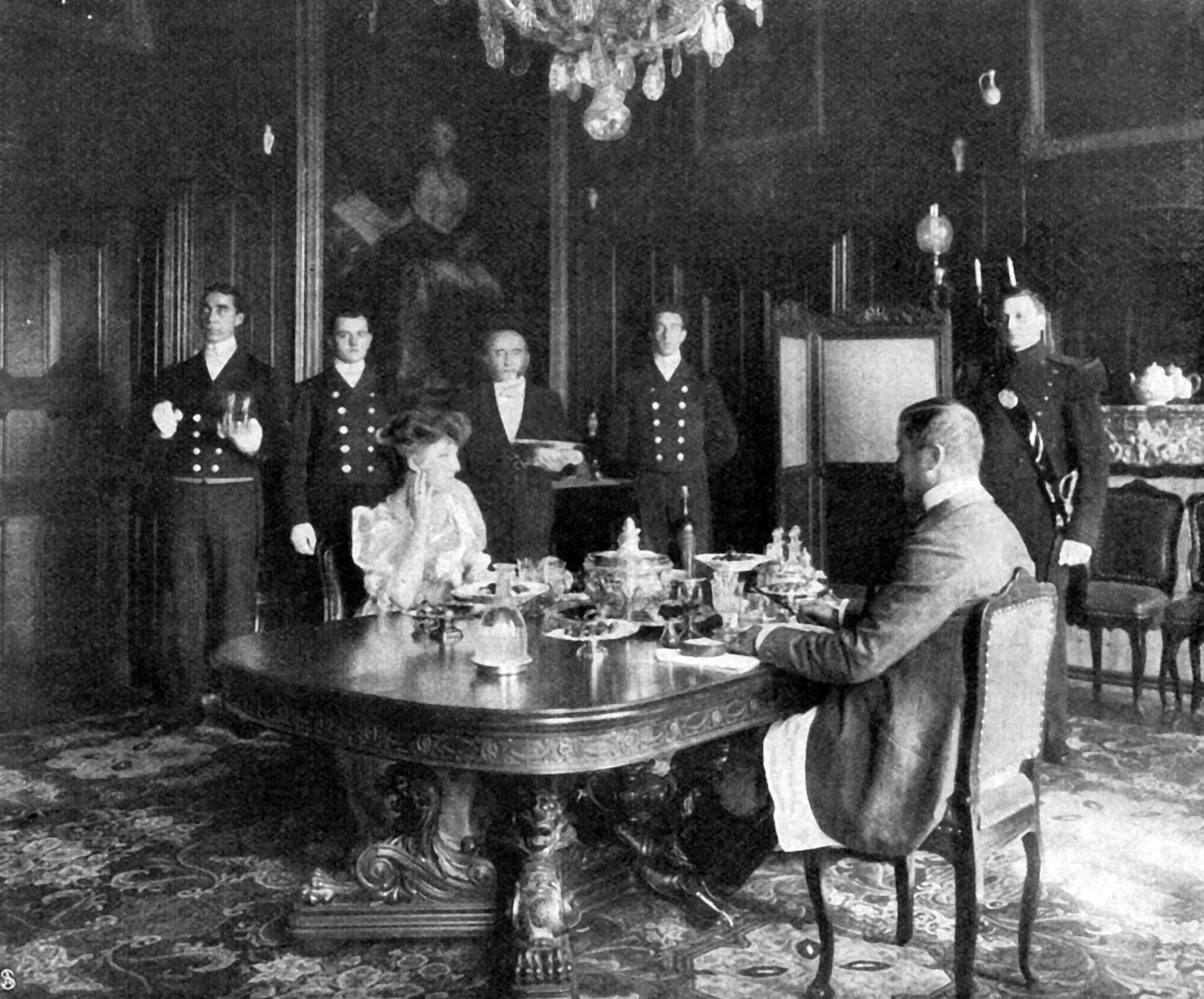 Engelbert-Maria, 9. Herzog von Arenberg, und seine Frau Hedwige de Ligne beim Frühstück im Speisezimmer